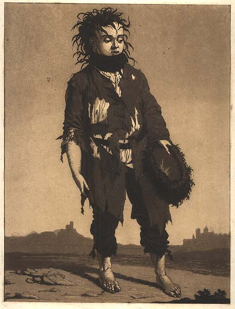 Ludwig Buchhorn: Grafik aus der Serie Betteljugend, Aquatinta-Radierung